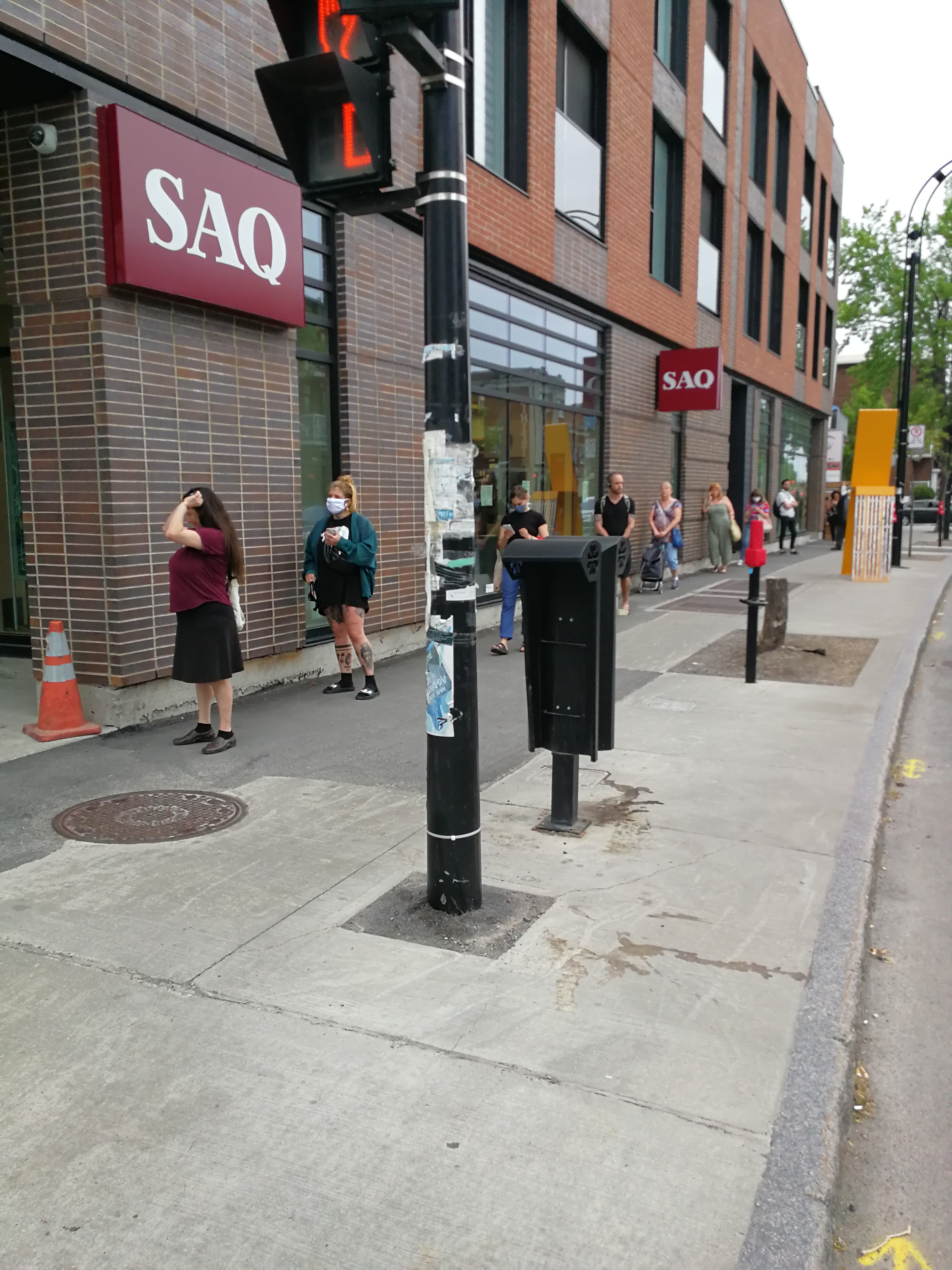 File d'attente à la SAQ temps de pandémie de Covid-19. On voit la file à l'extérieur, avec une distance de 2 mètres entre les personnes. Certaines d'entre elles ont un masque.